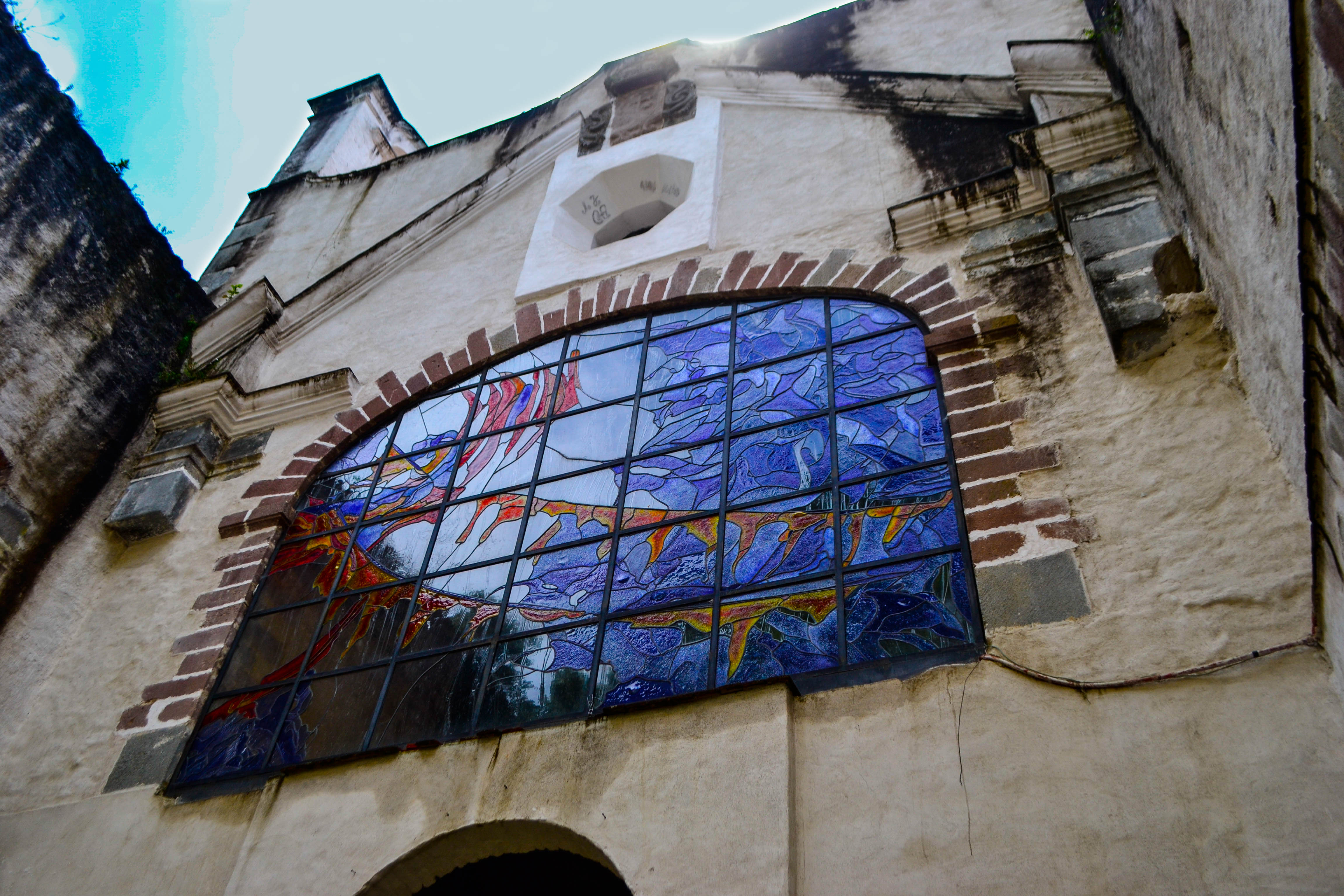 Este vitral está ubicado en la parte superior de la entrada principal a la iglesia. Los colores crean una armonía entre si y representa el tema del os cuatro elementos. Cuando la luz del sol llega al vitral, se crea un reflejo de colores que iluminan el interior de la iglesia.